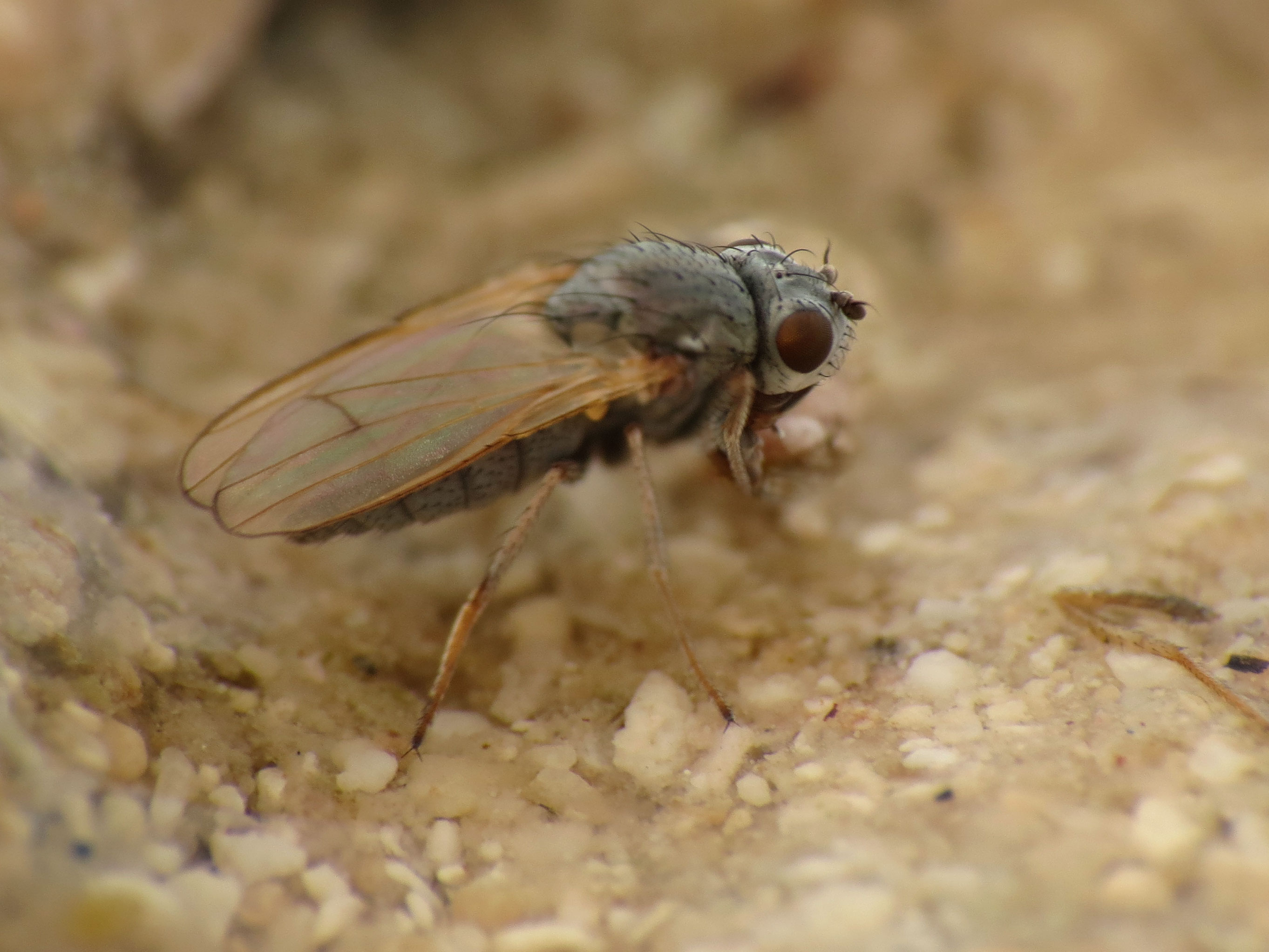 Ephydra sp. Celestún Biosphere Reserve, Yucatán, México.